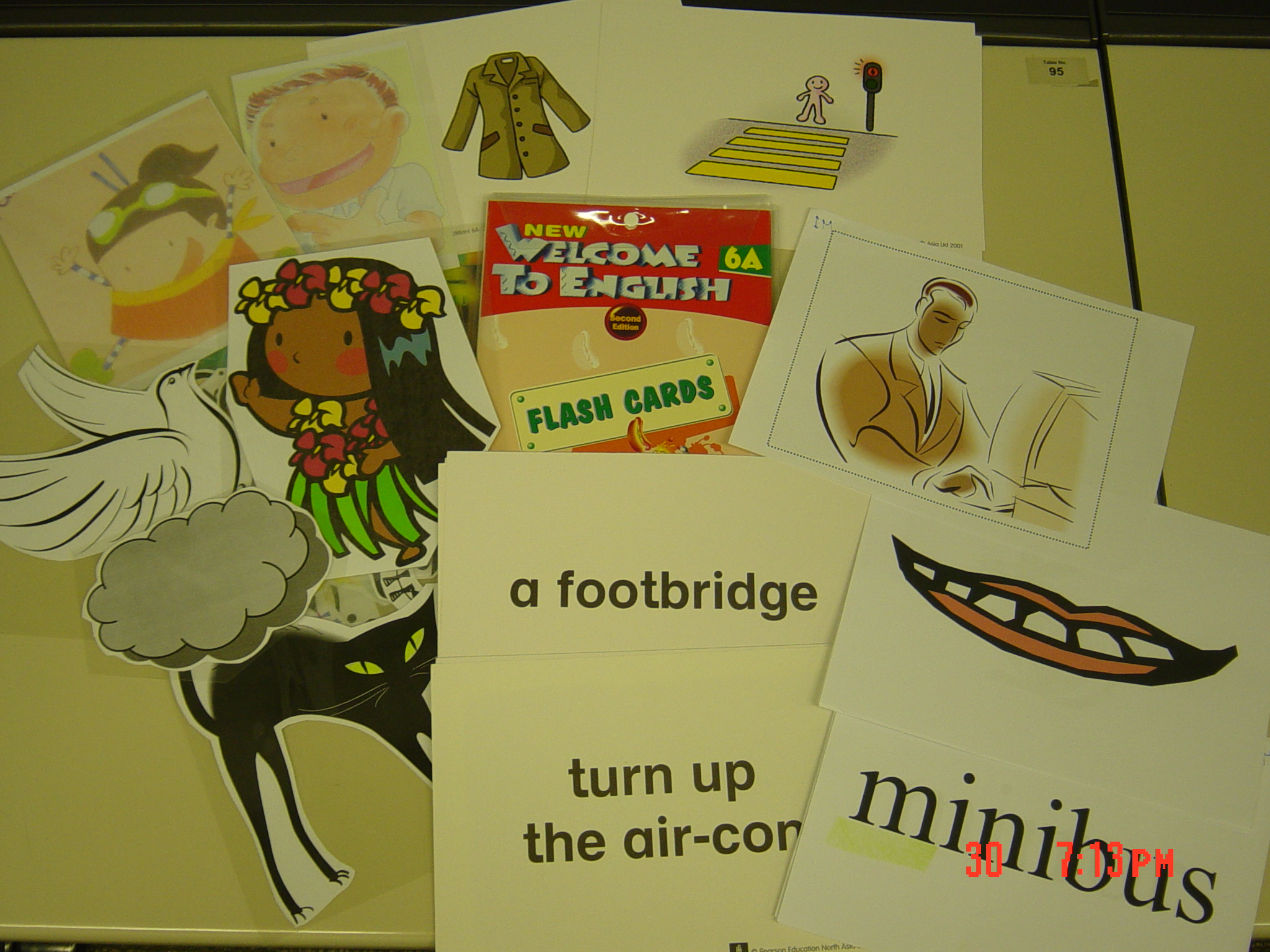 這是石添小草在教學上試用的英文科閃卡，攝於11:26 2005年12月30日 (UTC)。當中除了中間的部份由出版社提供外，其他的都是我親手造的。